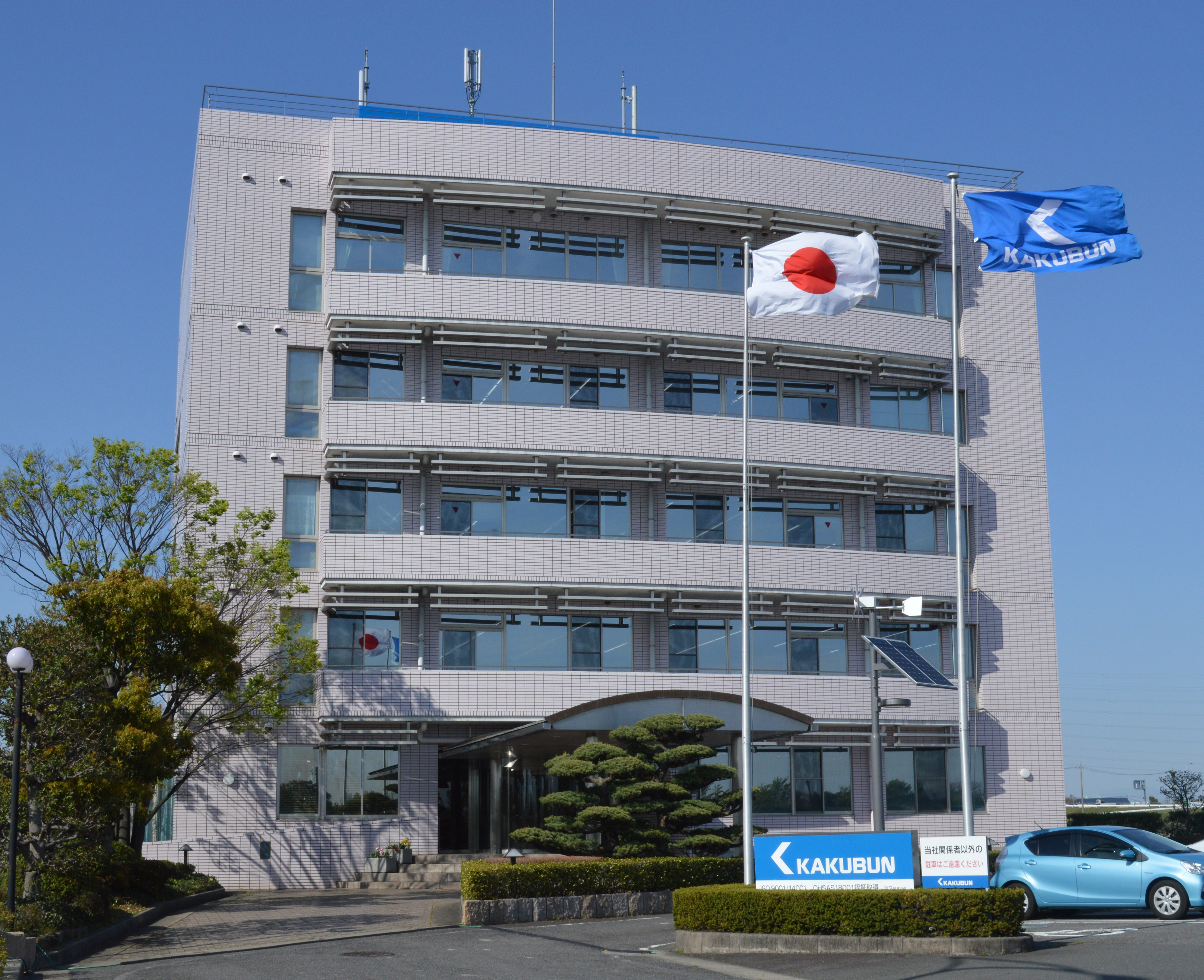 角文株式会社。愛知県刈谷市泉田町。